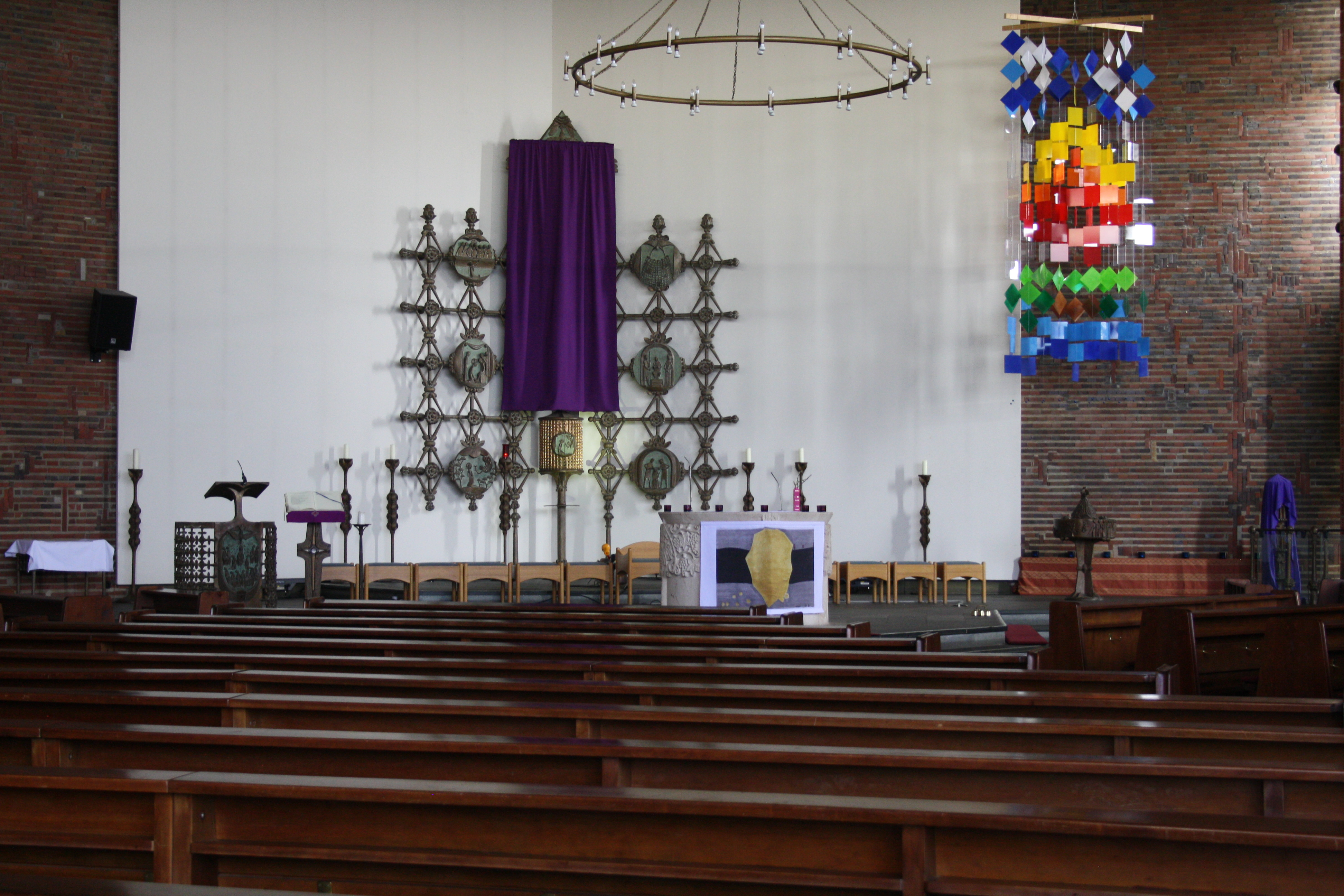 Heilig-Geist-Kirche (Stade